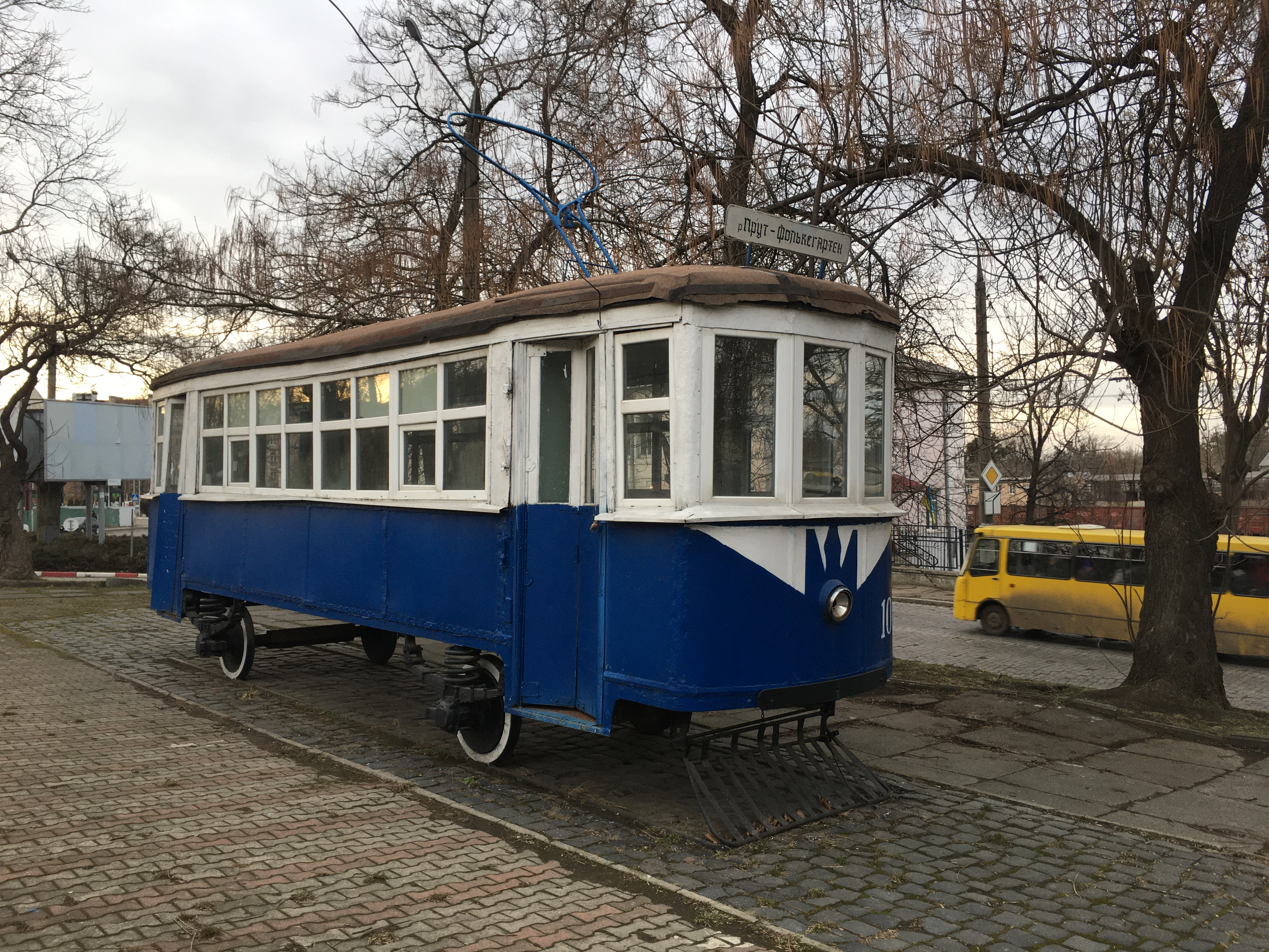 Памятник трамваю в Черновцах